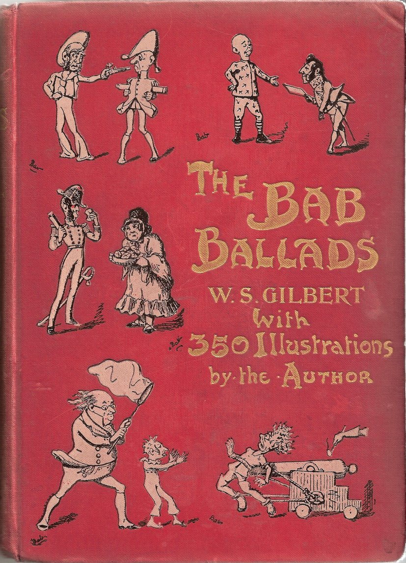 Ausgabe von 1898 von W.S. Gilberts The Bab Ballads with which are included Songs of a Savoyard